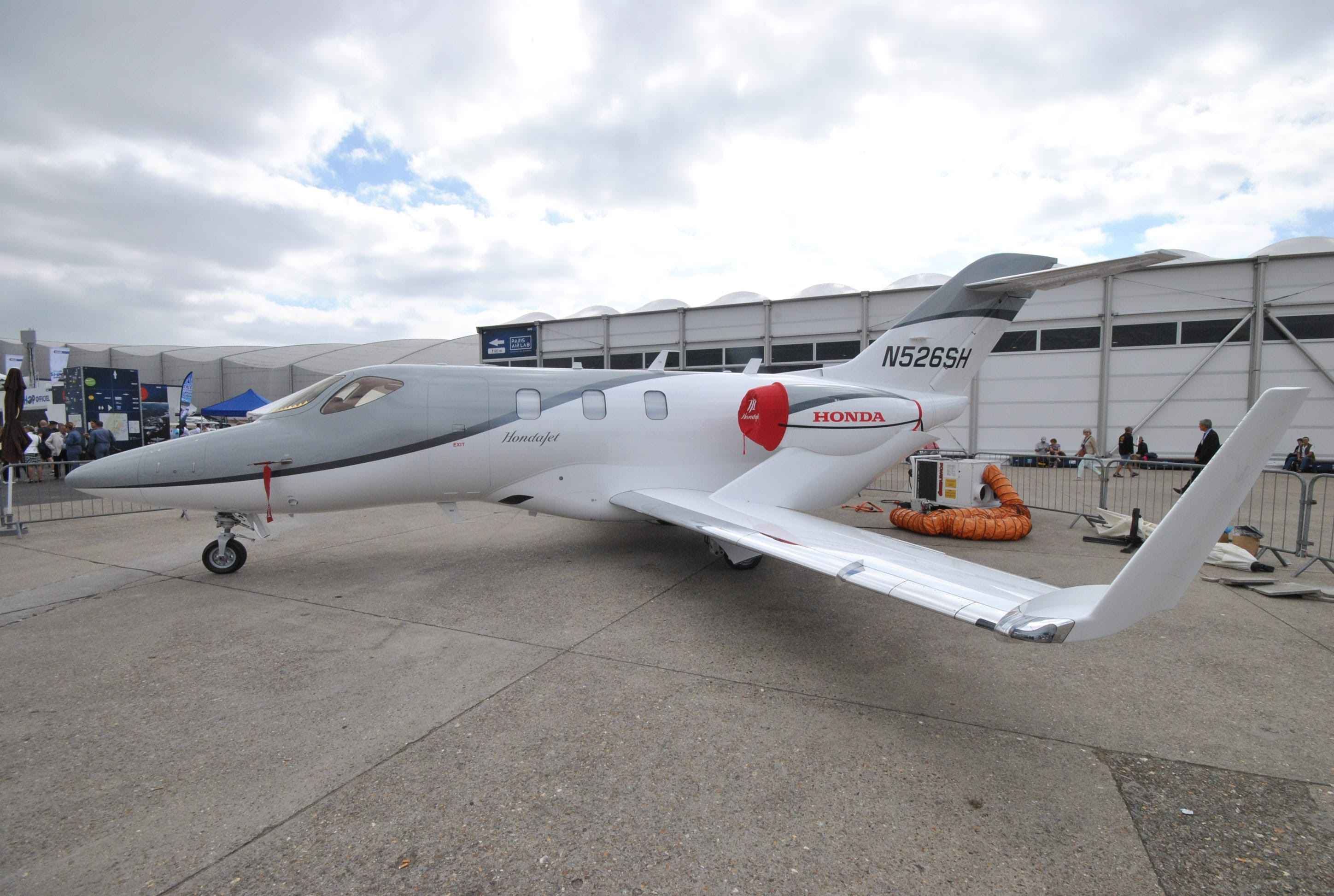 Paris Air Show 2017 Honda HA-420 HondaJet